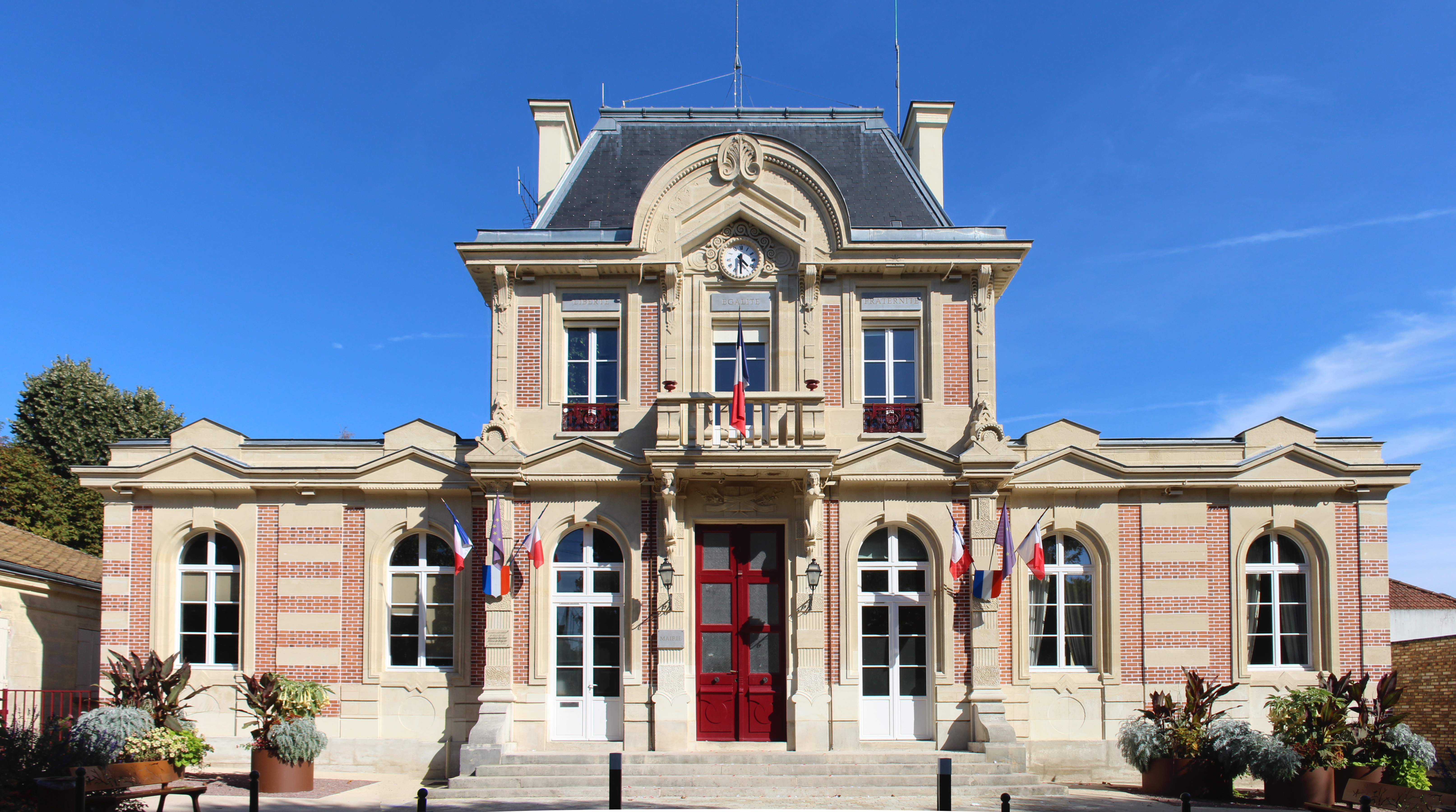 Mairie de Boissy-Saint-Léger.